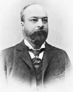 Andrea Jatta, Ritratto fotografico di Antonio Jatta, Creative Commons